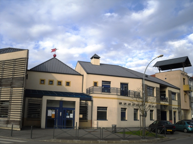 La Maison de la Petite Enfance à Grigny (91)